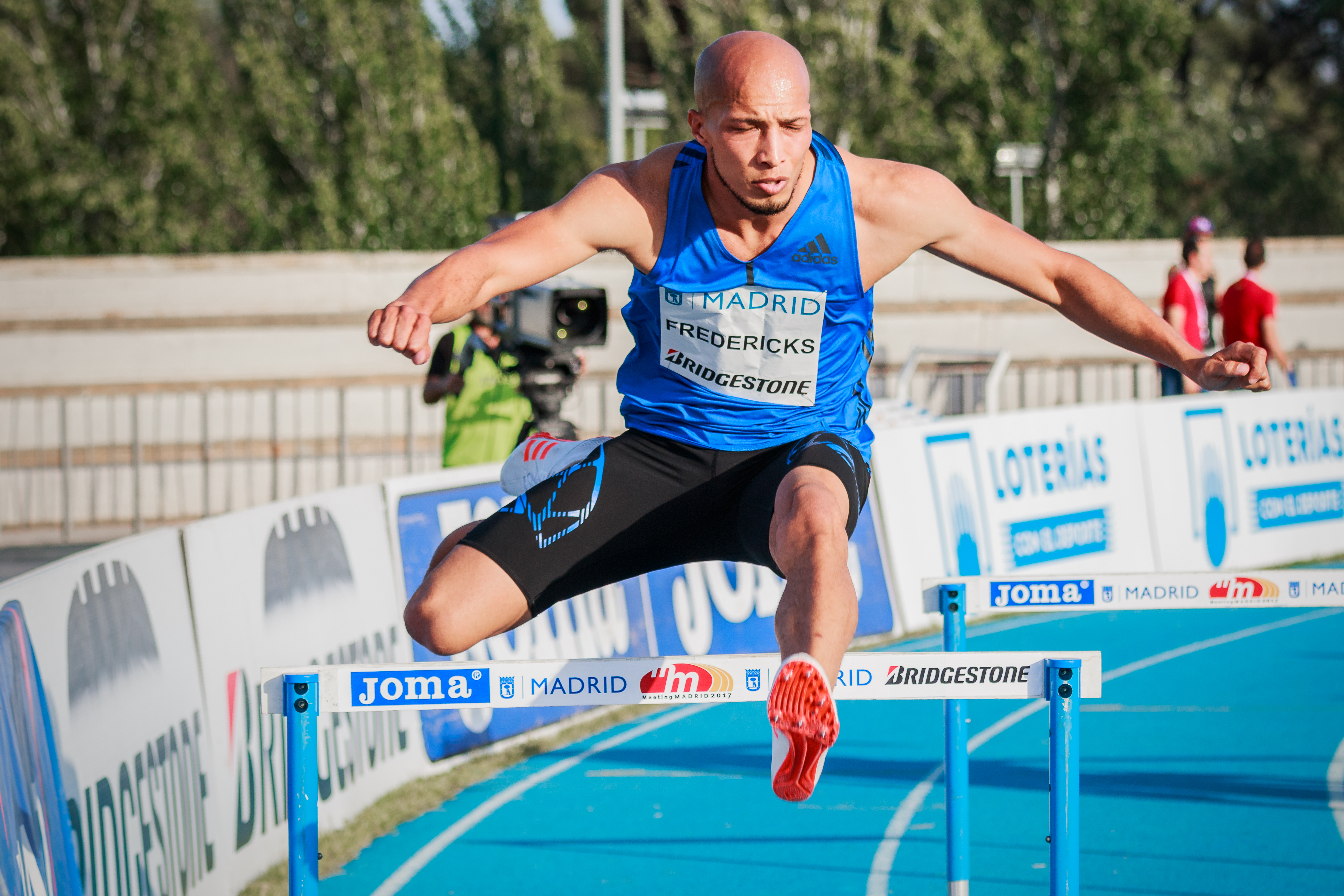 Cornel Fredericks (RSA) . 400 m vallas (final A). IAAF World Challenge. Meeting Madrid 2017. Moratalaz, Madrid.